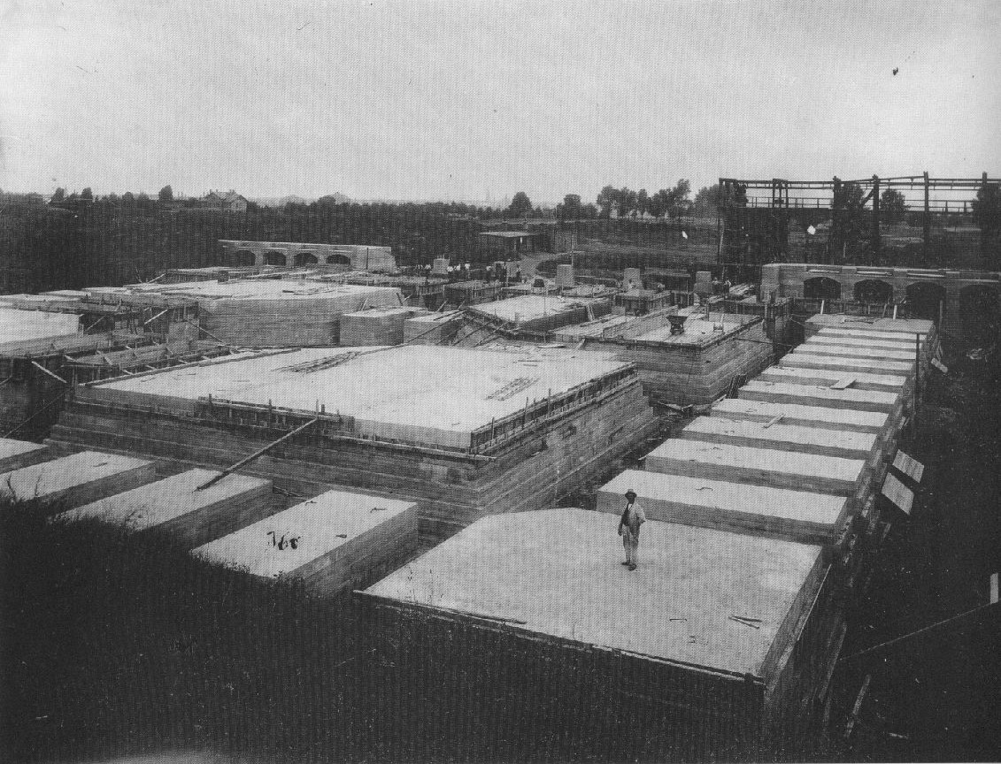 Fundamente des Völkerschlachtdenkmals im Jahre 1902. Leipzig, Preußenstraße (heute Prager Straße).